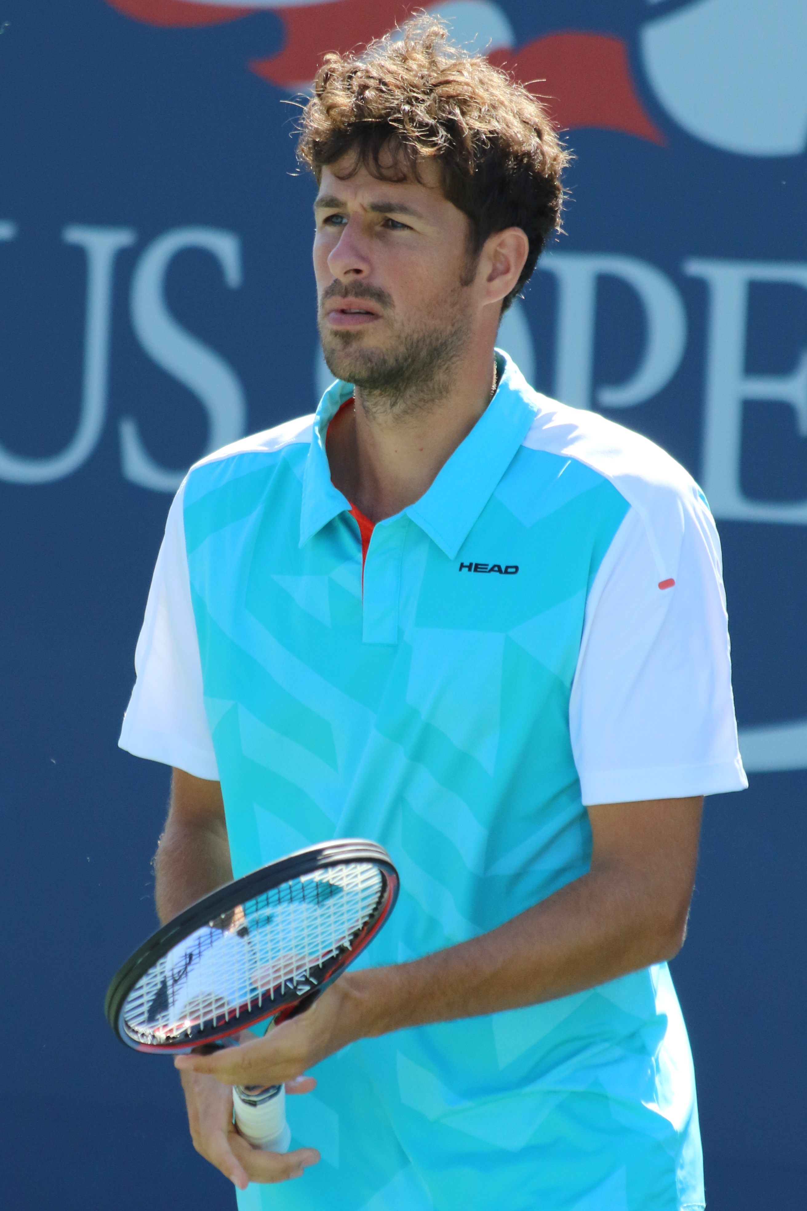 Haase US16 (23)